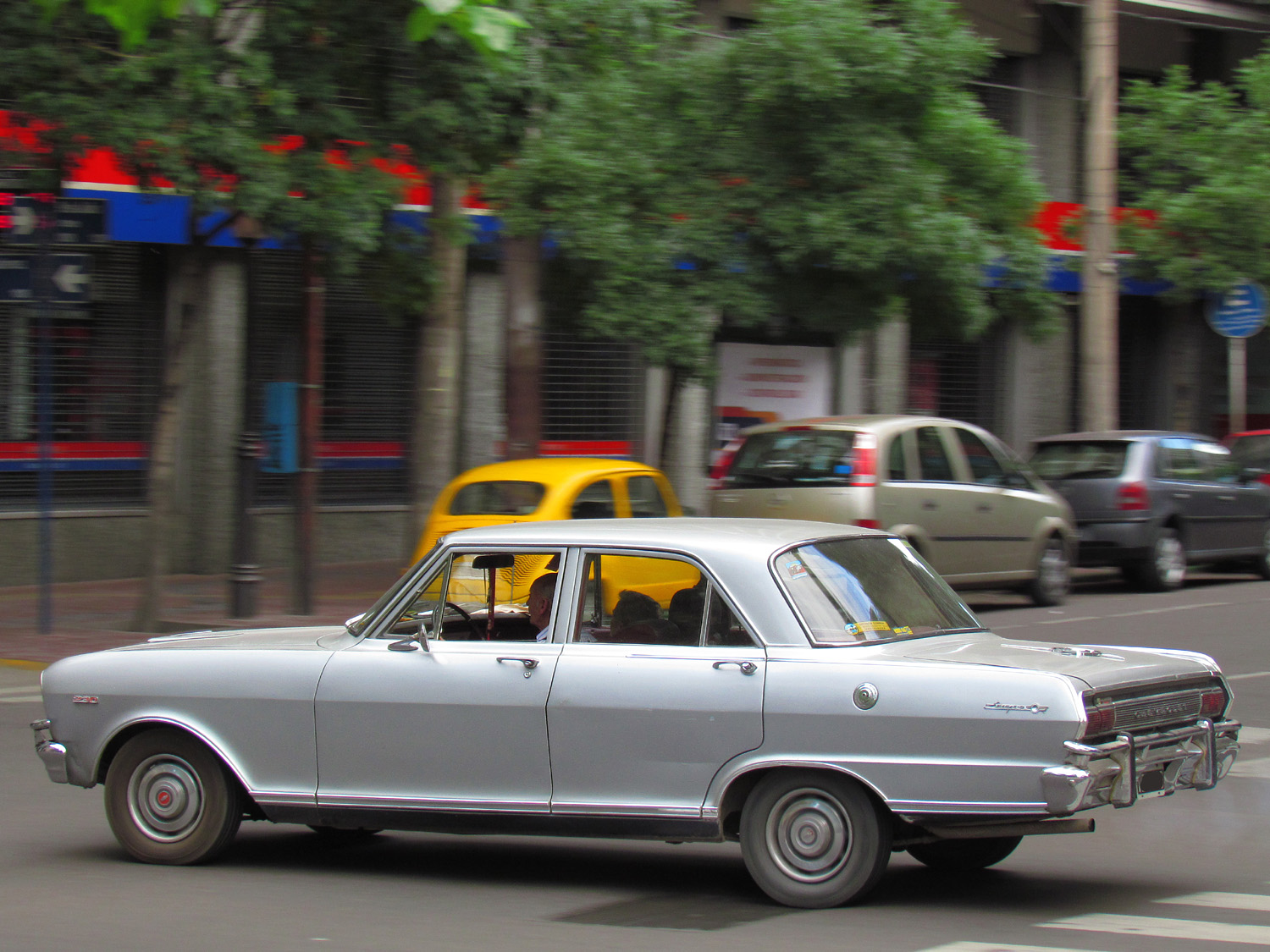 Chevrolet 400 Super 230 1967